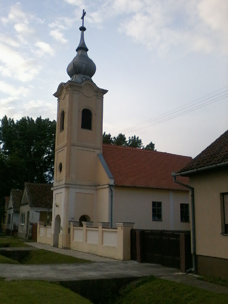 Crkva Svete Marije Magdalene, Miholjački Poreč.